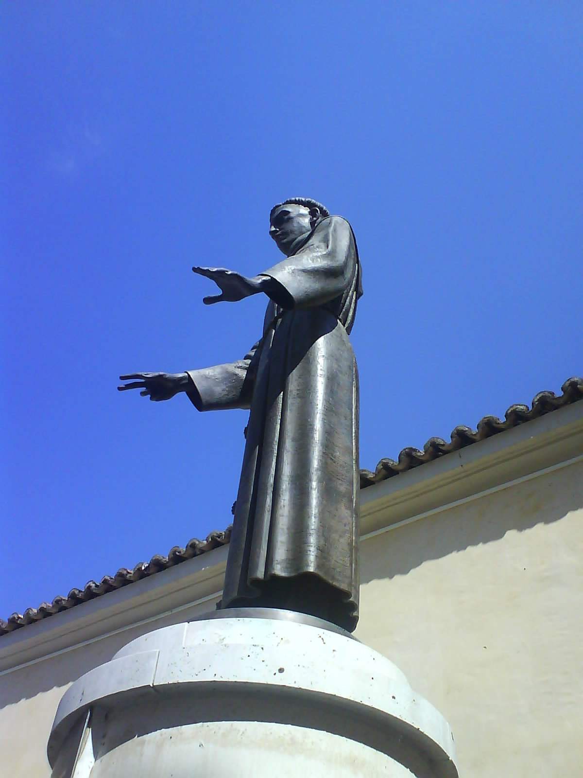 Estatua de San Pedro Regalado en la Plaza de El Salvador de Valladolid.